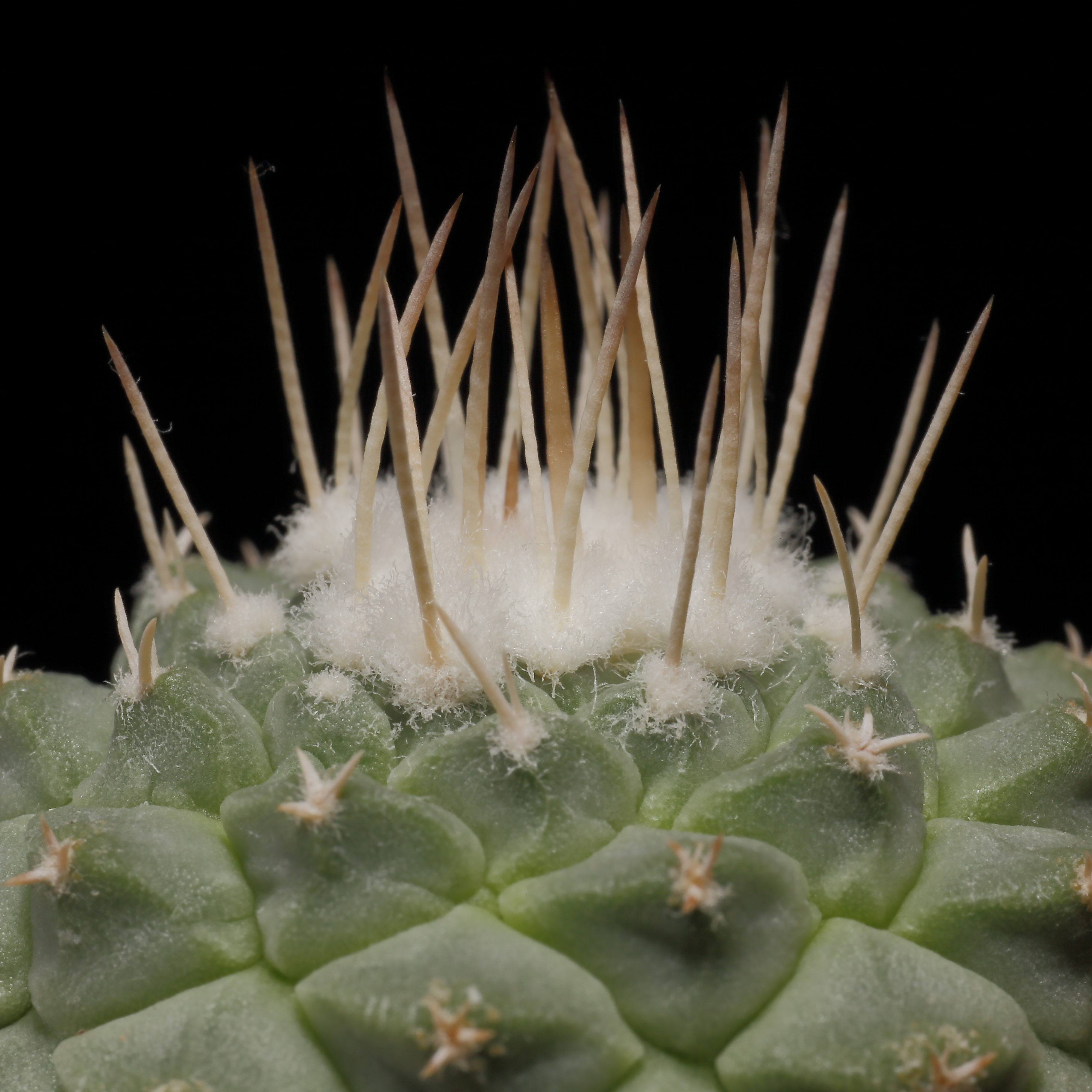 Strombocactus disciformis i närbild. Denna planta kommer från frö med fältnummer VB 15.